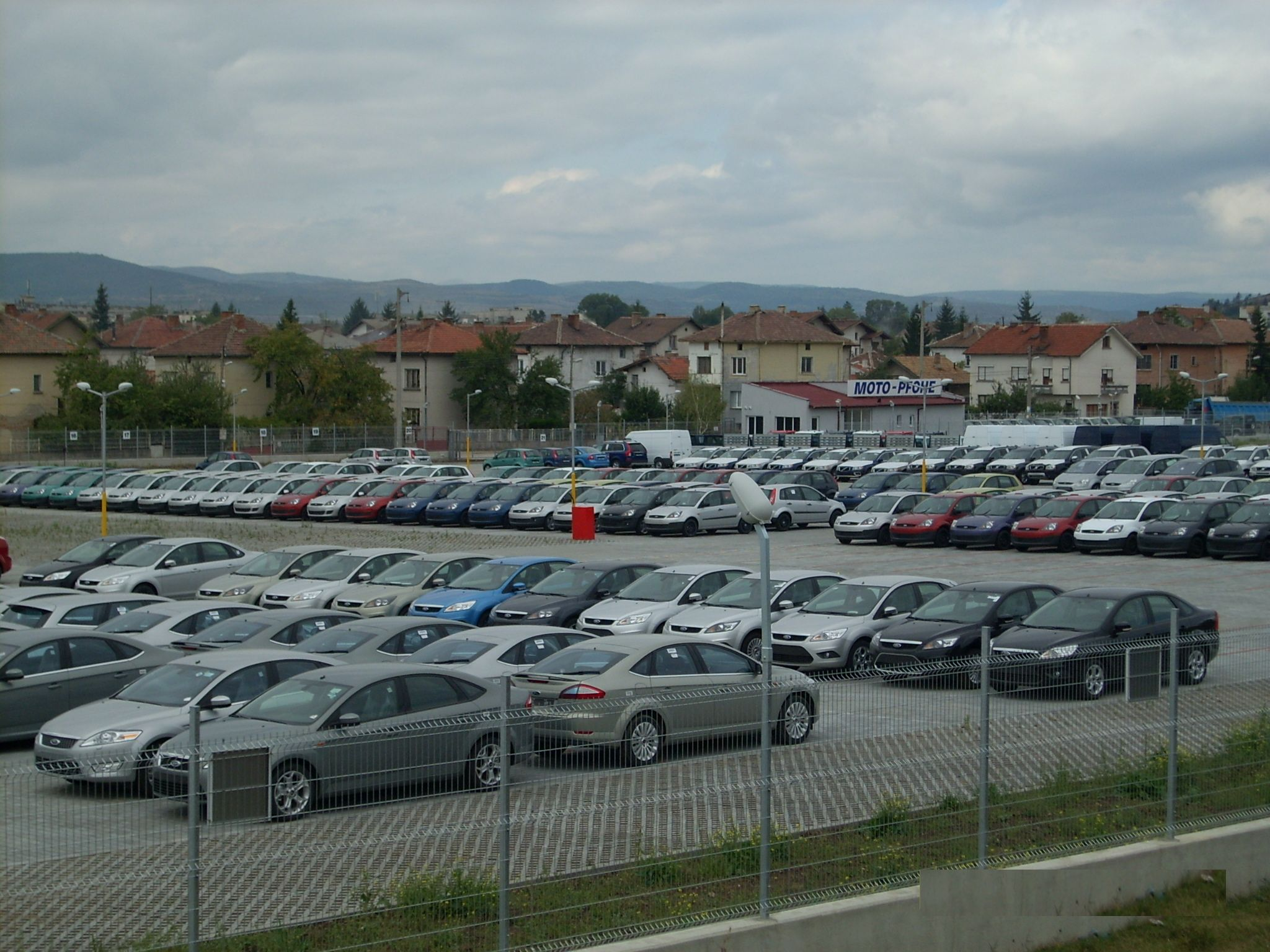 FORD Moto-Phoe storage Slivnitsa, Bulgaria